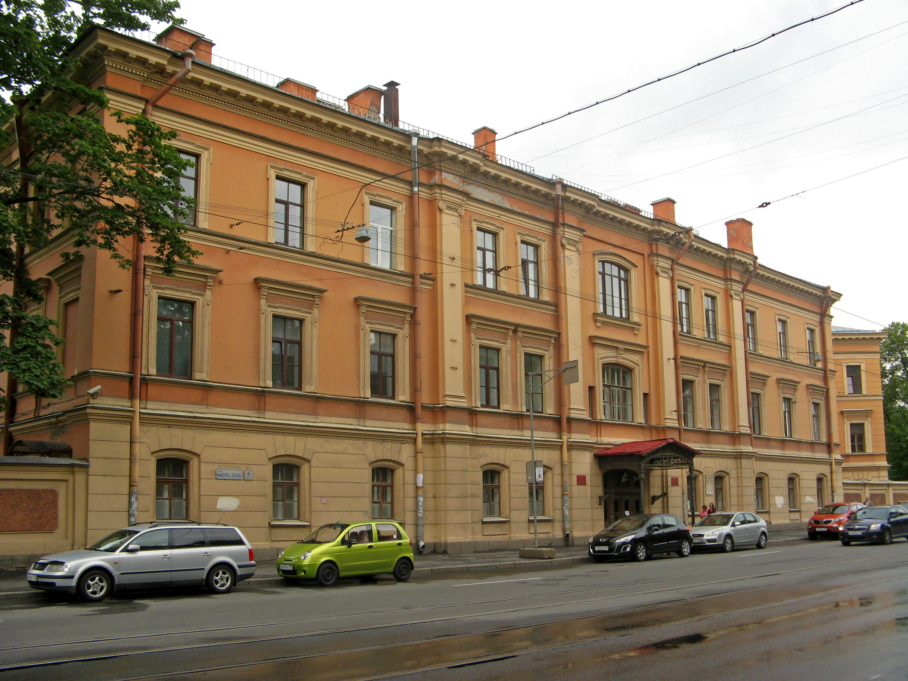 Больница Михайловская клиническая им. Виллие Я. В.: улица Академика Лебедева, 6 лит. А, Выборгский район, Санкт-Петербург